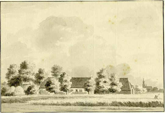 "t Klooster te Soest 1731" Catalogusnummer: 200833 Opschrift: "S 18" Beschrijving: Gezicht op het klooster Marienburg bij Soest. Datering: 1/1/1731-31/12/1731 Vervaardiger: Serrurier, L.P. Categorie beeldmateriaal: Tekeningen en prenten Materiaalsoort: tekening Techniek: pen en penseel in grijs Afmetingen: breedte 200 millimeter , hoogte 135 millimeter